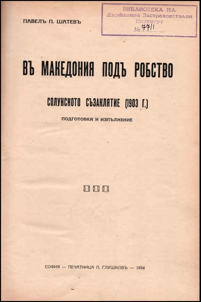 Корица на книгата на Павел Шатев "В Македония под робство"